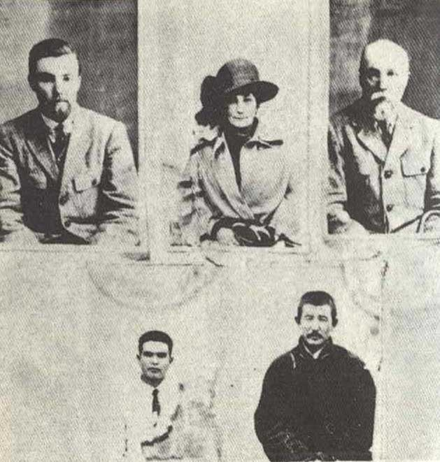 Фотография с экспедиционного паспорта до Пекина, выданного китайским губернатором в Урумчи в 1926 году во время Центрально-Азиатской экспедиции Н.К.Рериха. Верхний ряд (слева-направо): Ю.Рерих, Е.Рерих, Н.Рерих. Нижний ряд: первый слева лама с галстуком - Я.Блюмкин, следующий - лама Рамзана.